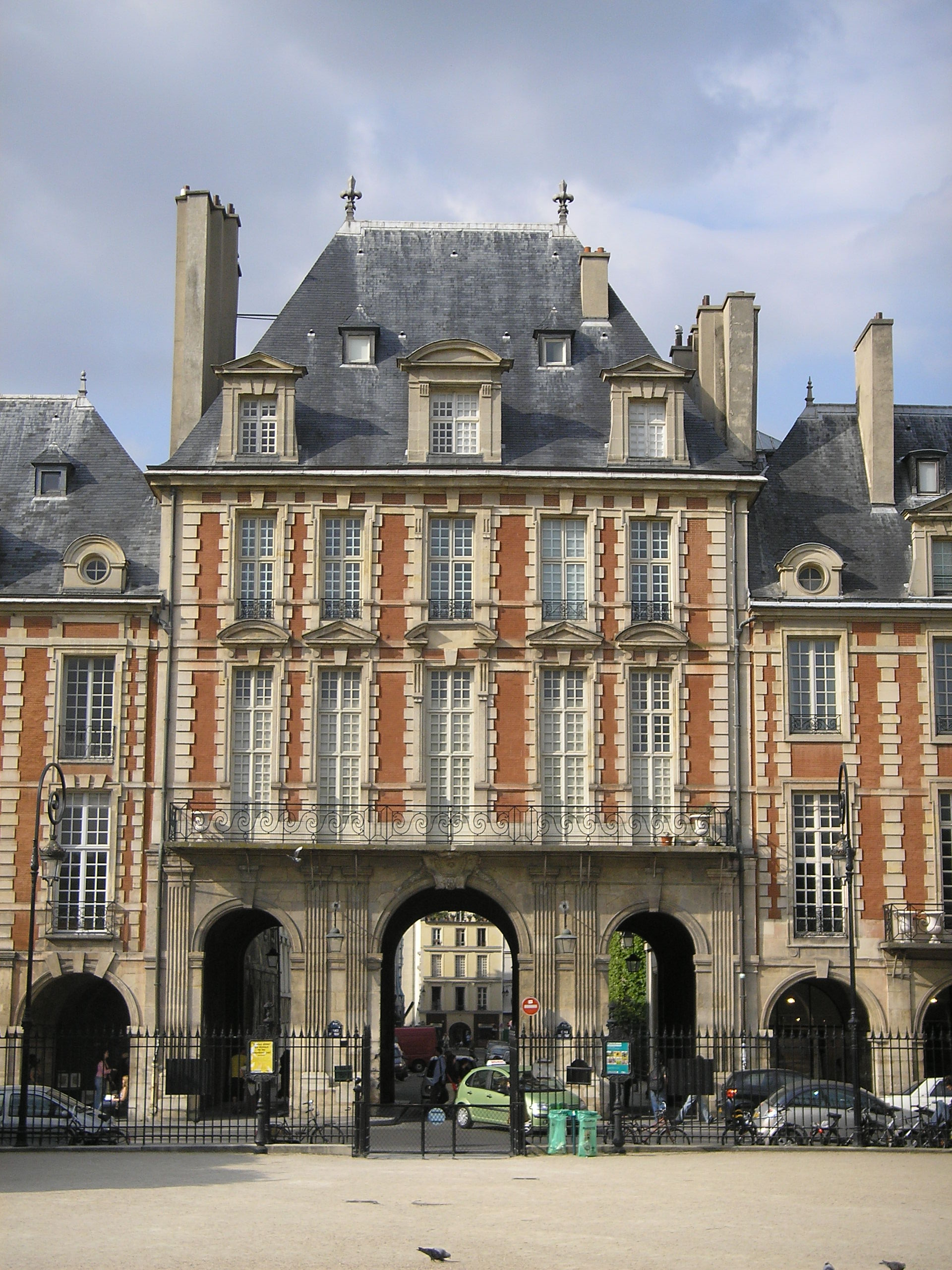 Place des Vosges in Paris, the Pavillion de la Reine.